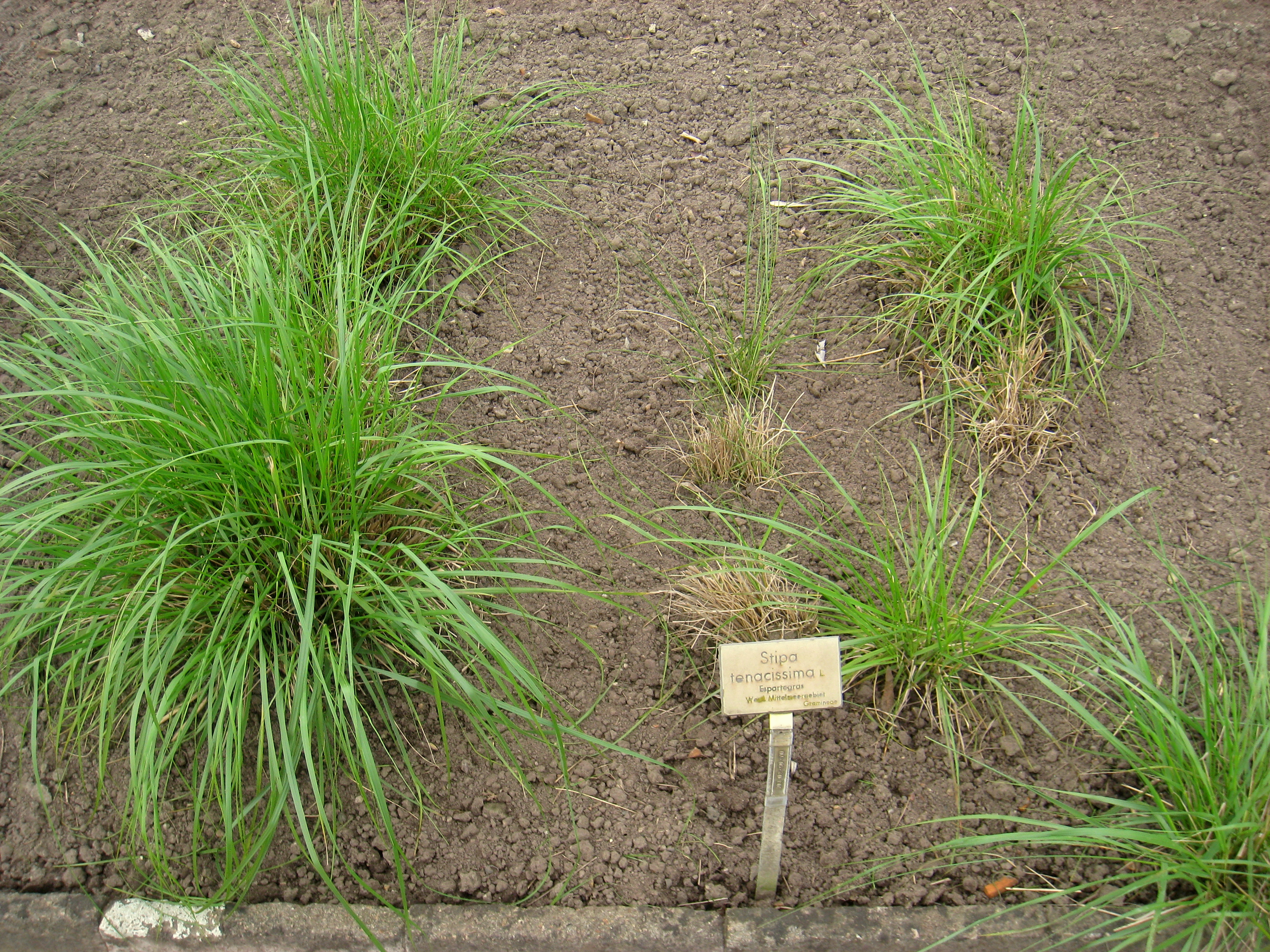 Stipa tenacissima specimen in the Botanischer Garten, Berlin-Dahlem (Berlin Botanical Garden), Berlin, Germany.